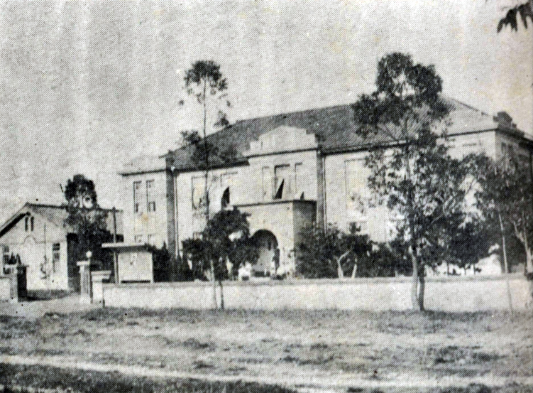 新竹州竹南郡役所